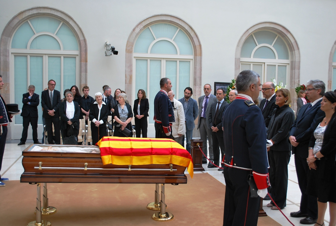 Comiat d'Heribert Barrera